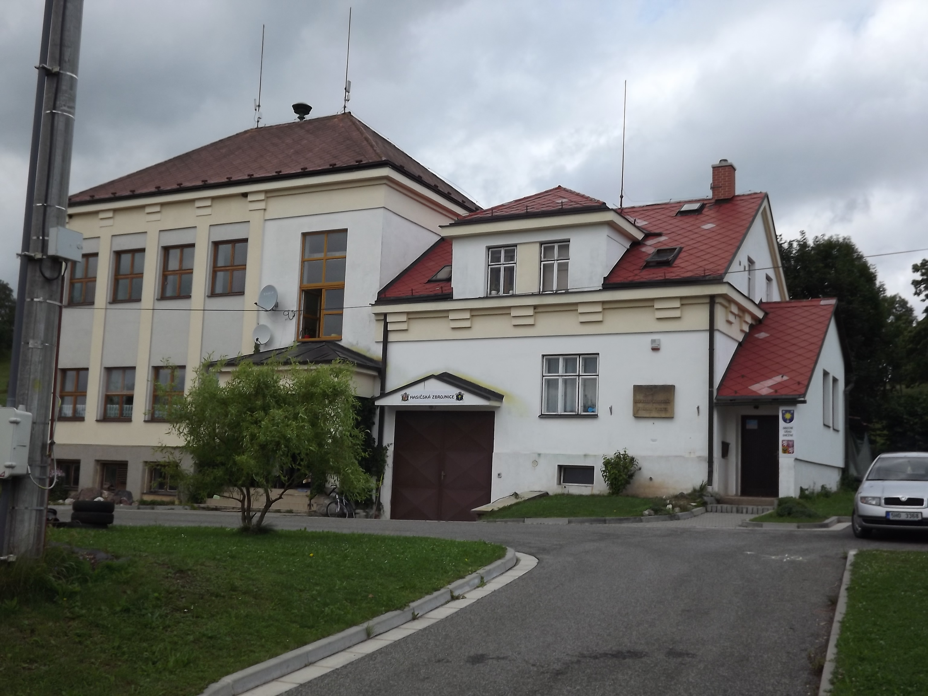 Obecní úřad